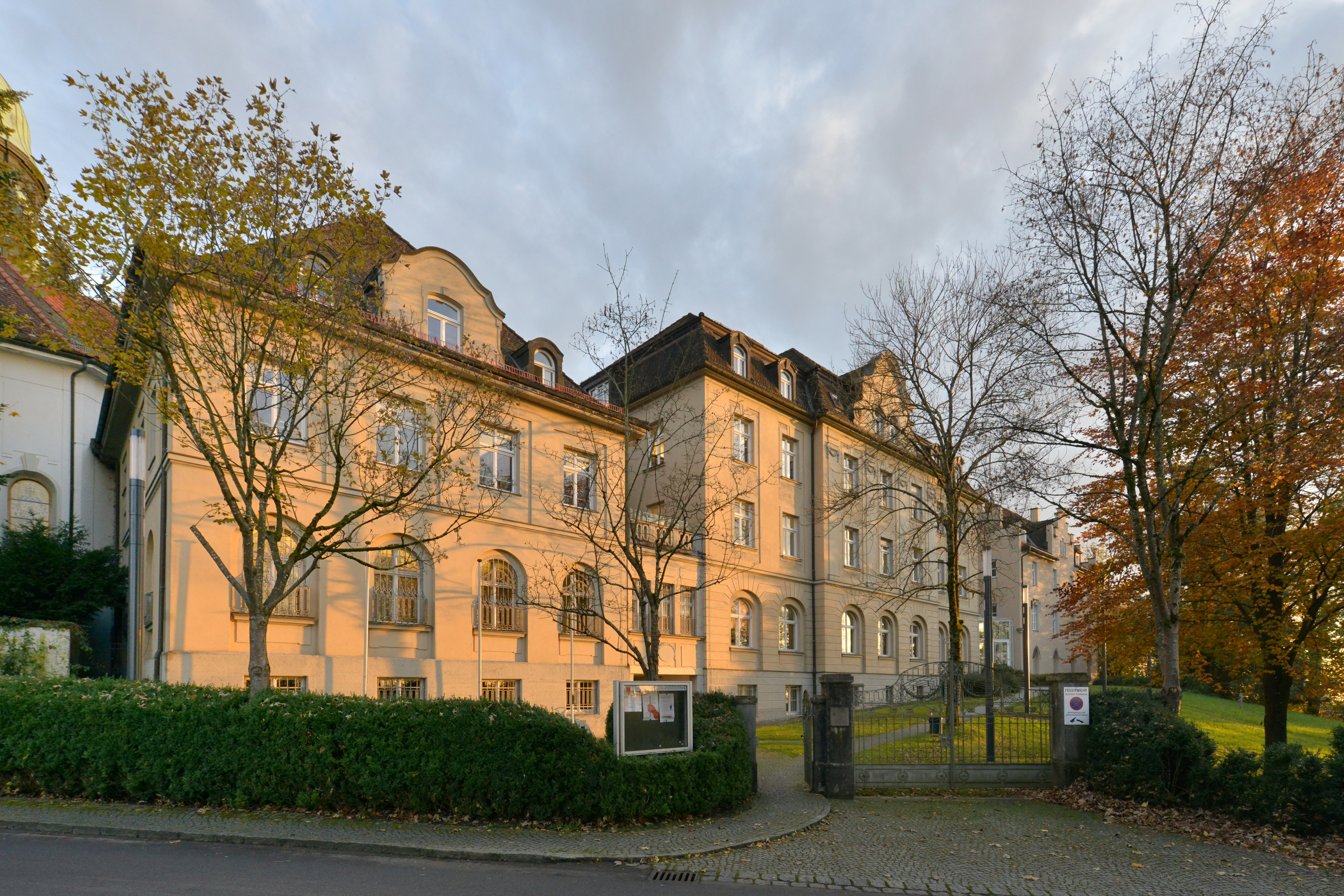 Panorama aus 7 Bilder Vorarlberger Landesbibliothek in Bregenz